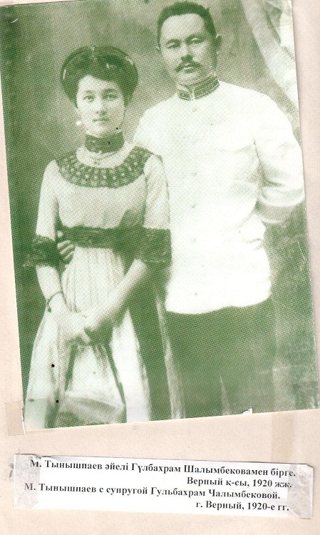 Мухаметжан Тынышпаев с супругой Гульбахрам Шалымбековой, г.Верный, 1920 год (из фондов Алматинского областного историко-краеведческого музея имени М.Тынышпаева)